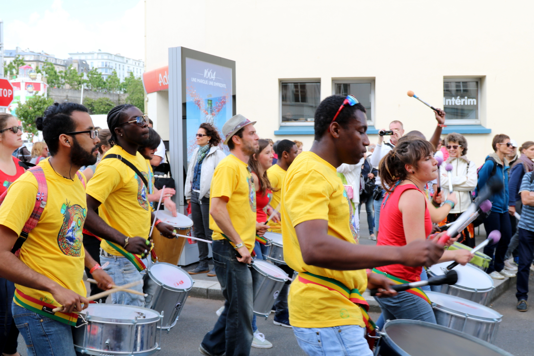 Bloco Samba à Brest 2016